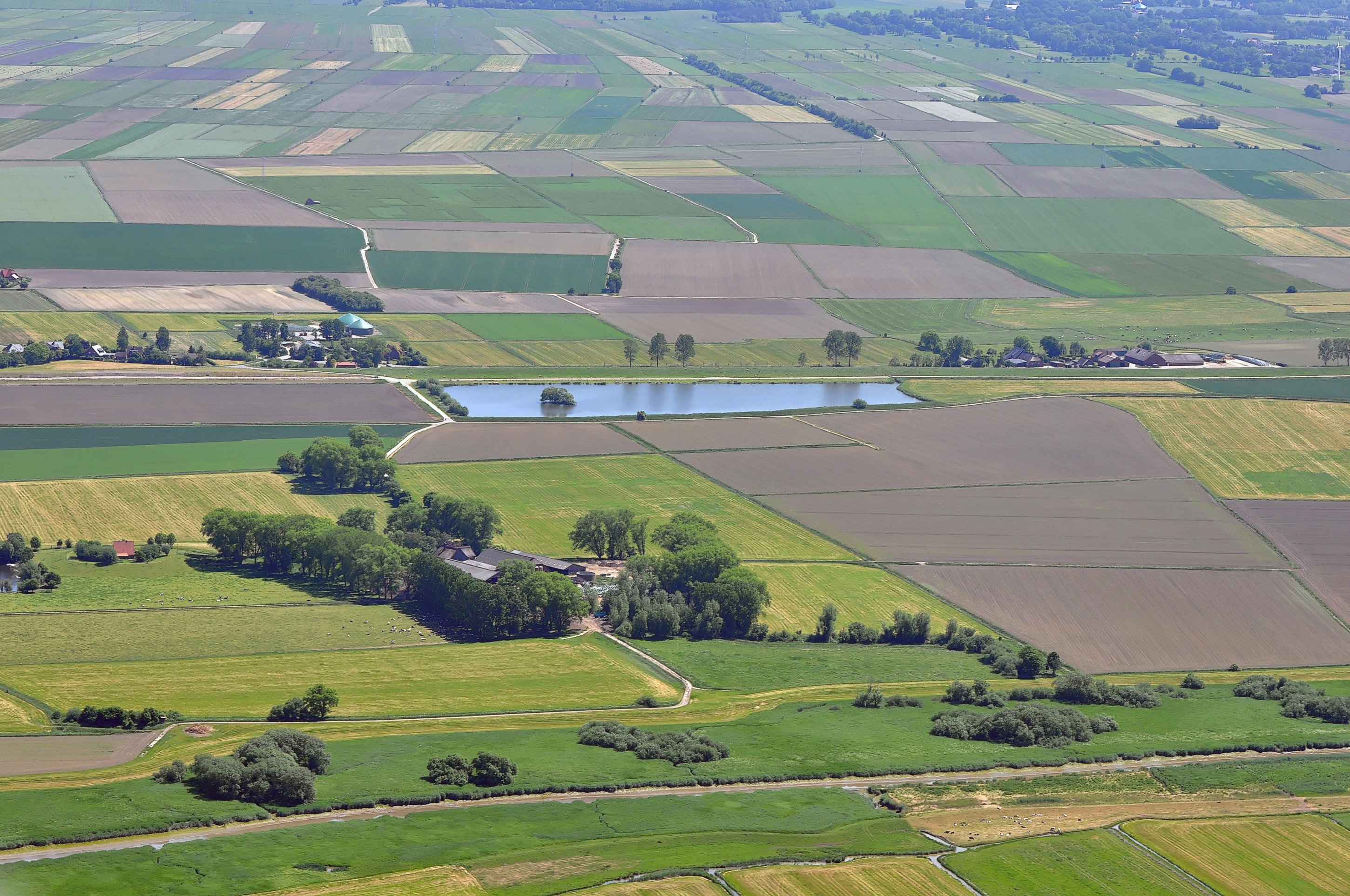 Teich und Gehöfte südwestlich von Aschwarden. Luftbilder von der Nordseeküste 2012-05